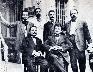 Fundadores da Unione Sindacale Italiana (USI). De Ambris, Masotti, Zocchi, Meschi, Giuseppe Di Vittorio e Corridoni.